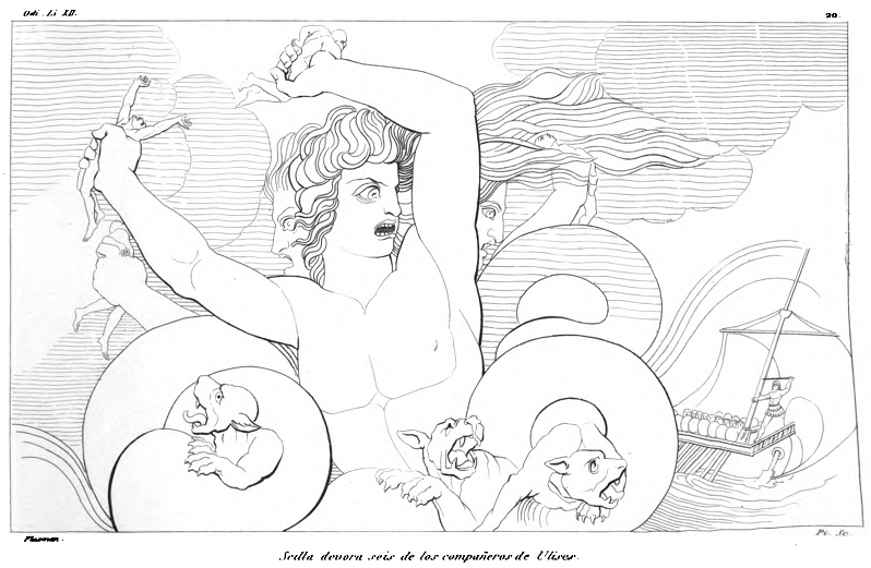 Scilla devora seis de los compañeros de Ulises. Dibujo de John Flaxman, grabado de Joaquín Pi y Margall.